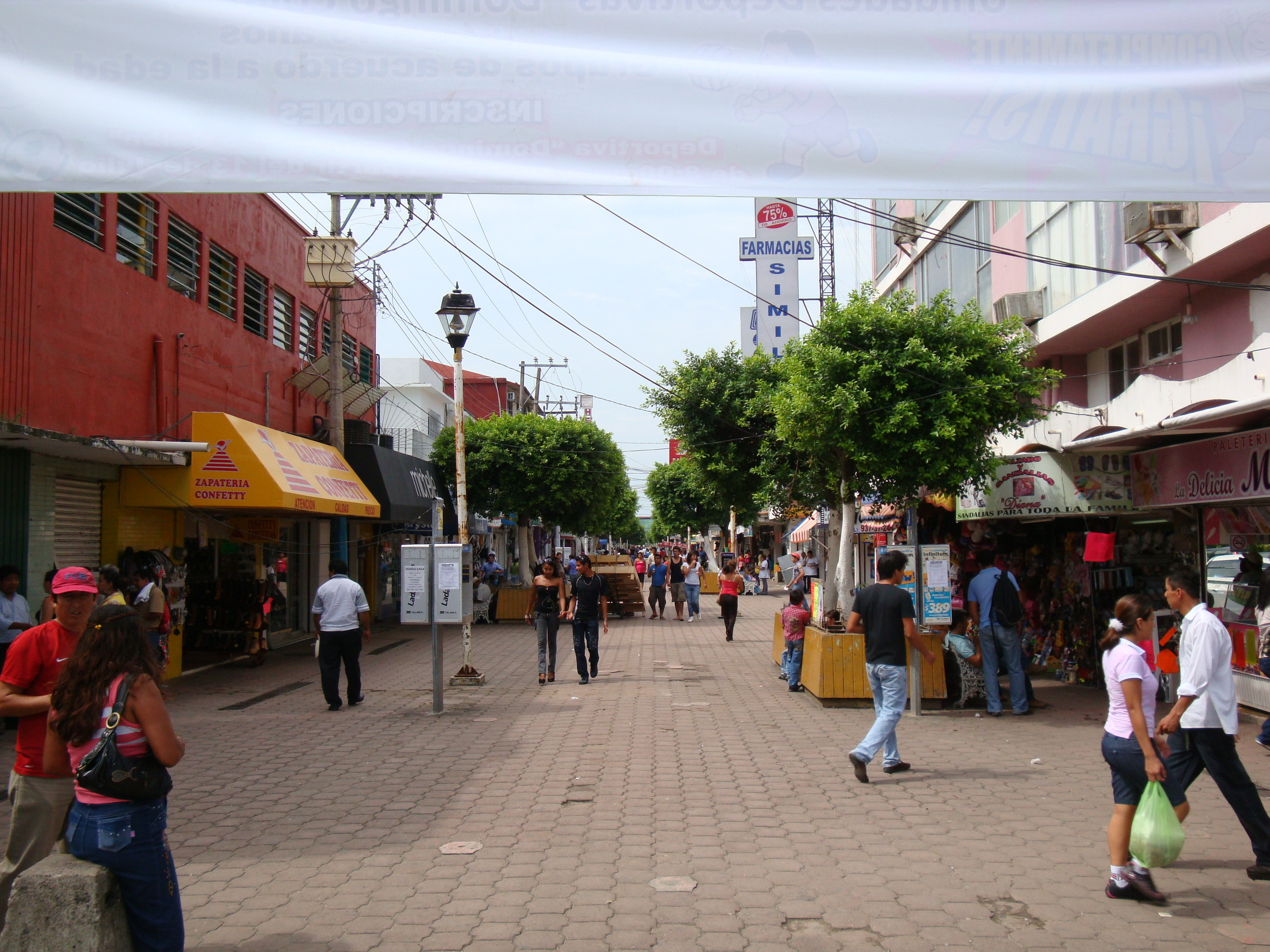 Calle peatonal del centro de la ciudad de Heroica Cárdenas, Tabasco, México.